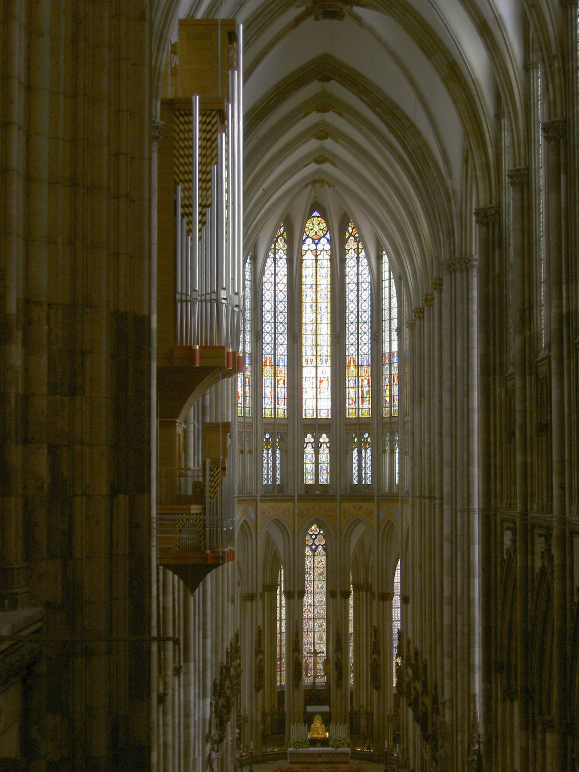 Innenansicht des Kölner Doms, aufgenommen vom Triforium über dem Haupteingang.